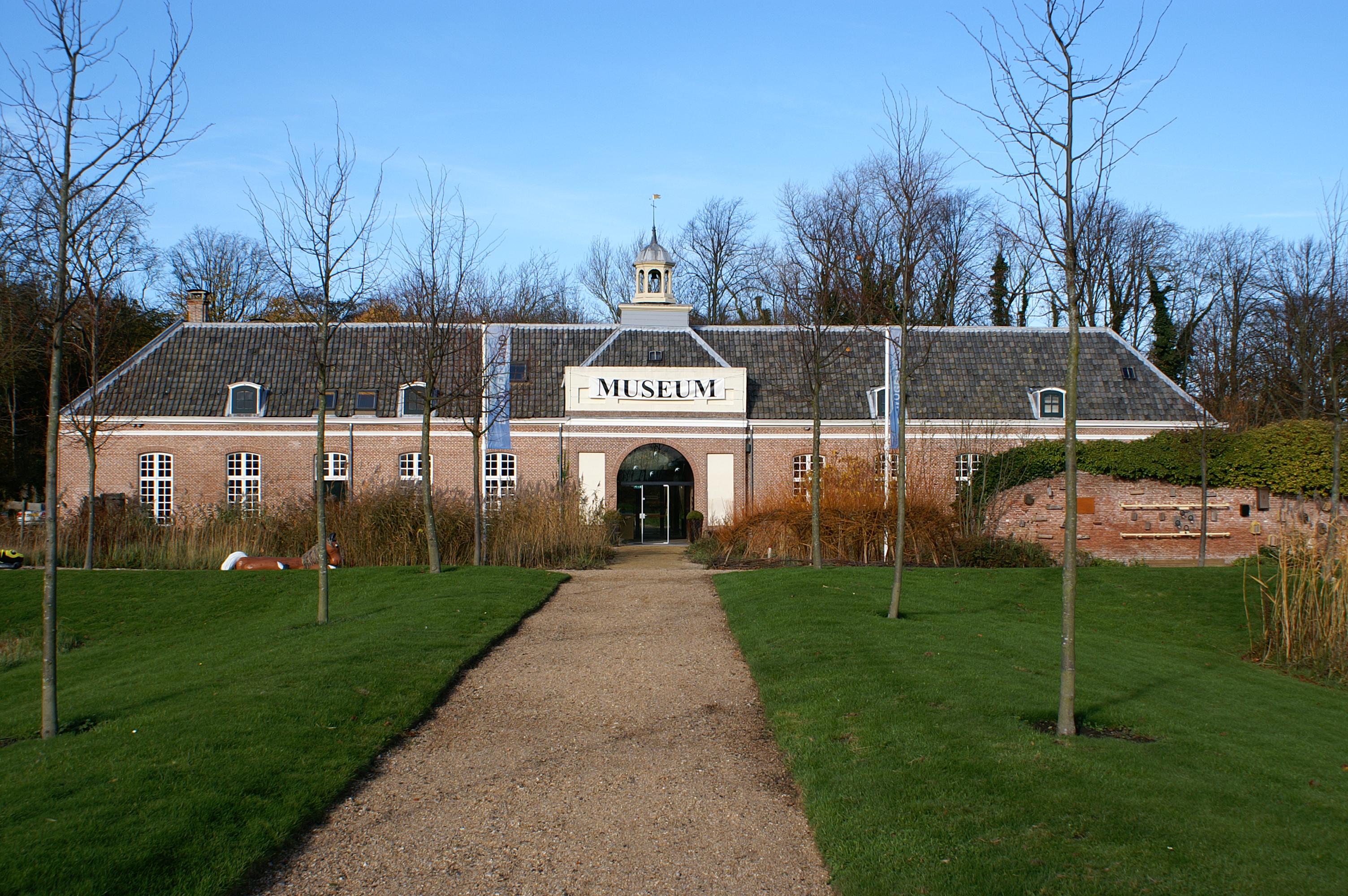 Zicht op een deel van de voormalige oranjerie van kasteel Westhove in Oostkapelle. Tegenwoordig is er museum Terra Maris, Duinvlietweg 6, 4356 ND Oostkapelle gevestigd. Terra Maris is een museum voor natuur & landschap van Zeeland